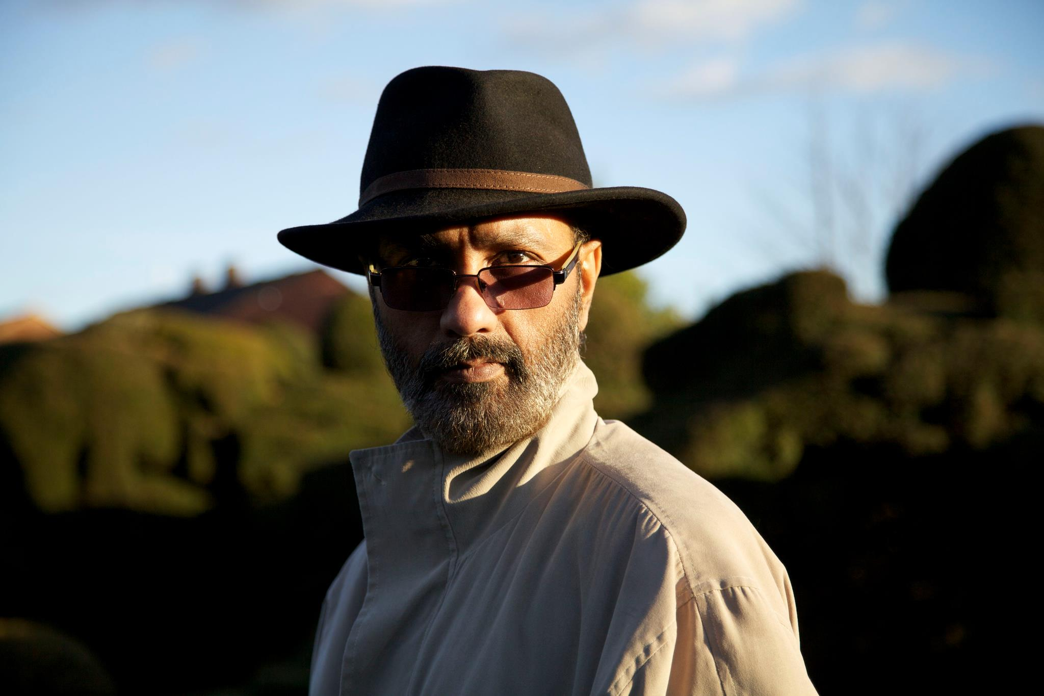 Sudipto Chatterjee